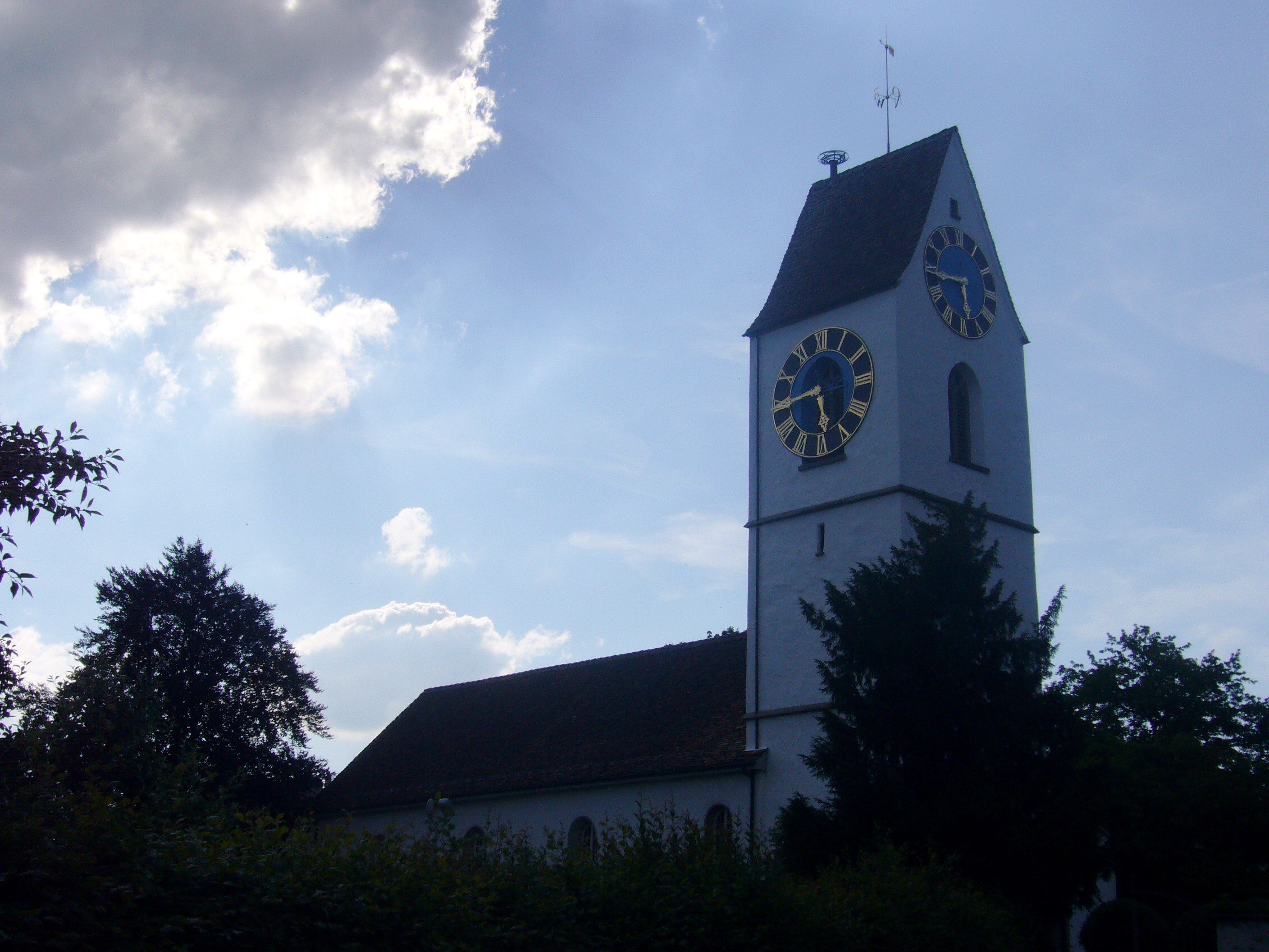 Reformierte Kirche Bassersdorf von Osten her gesehen.